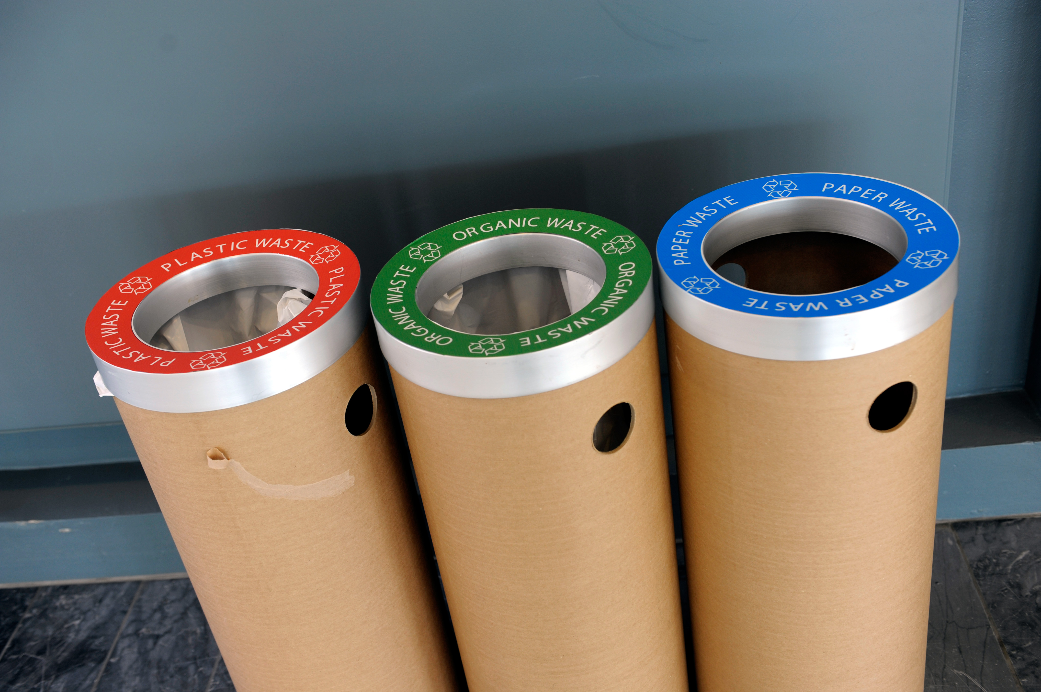 Källsortering av avfall